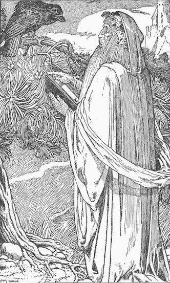 Merlin, The Enchanter vu par Louis Rhead dans Sir James Knowles's King Arthur and His Knights, 1923